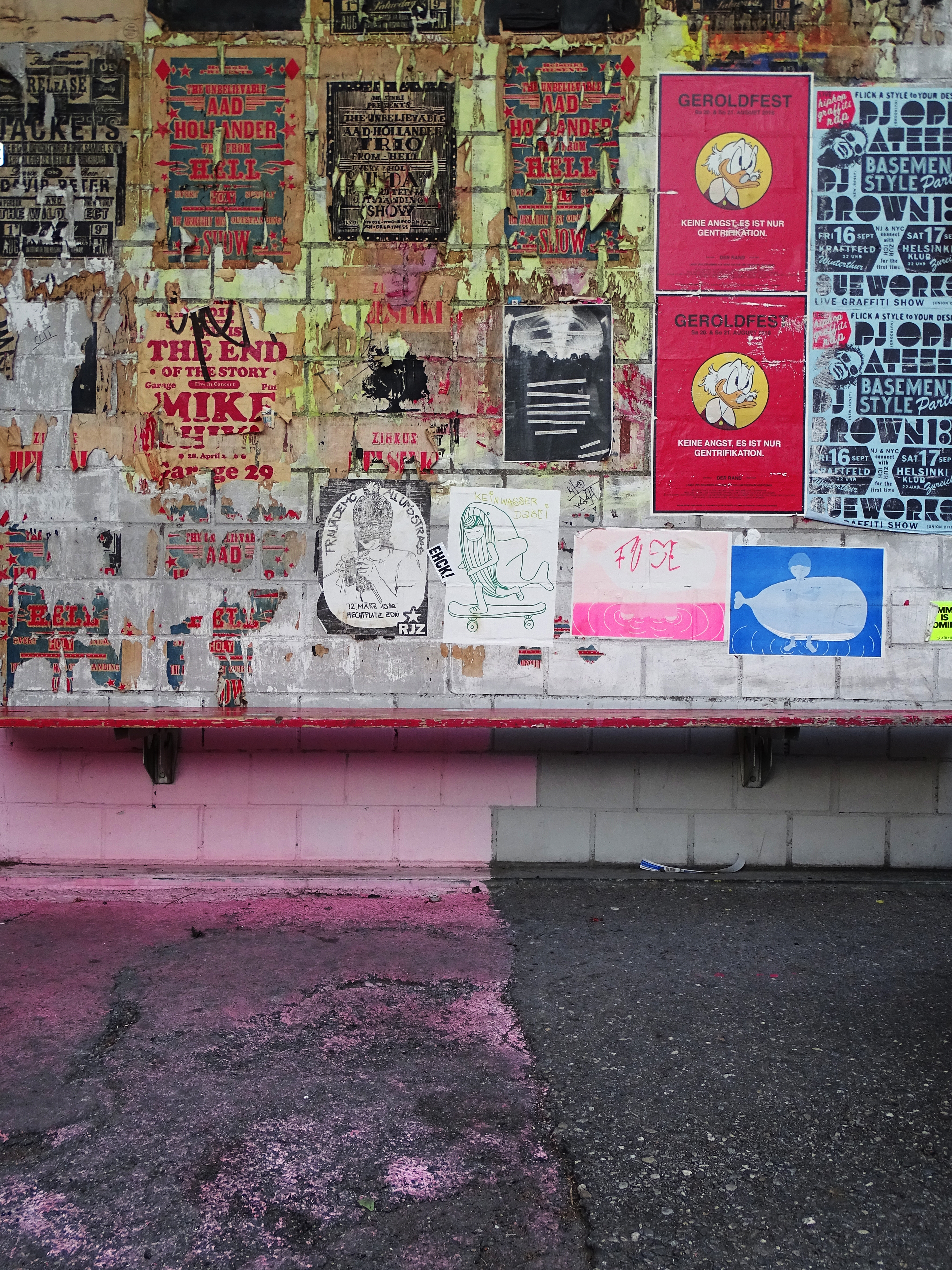 Helsinki Klub, Aussenwand, Zürich